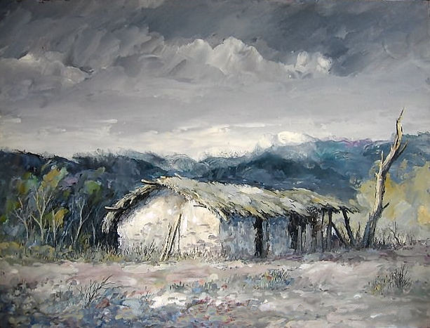 Técnica óleo